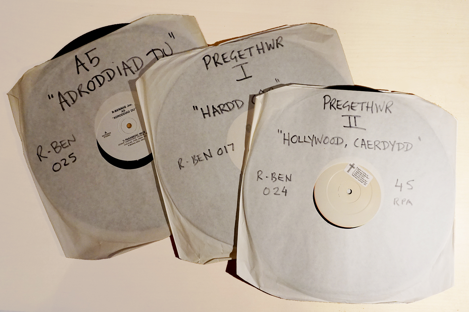 Ffotograff o Recordiau Senglau 12 Modfedd Label R-Bennig